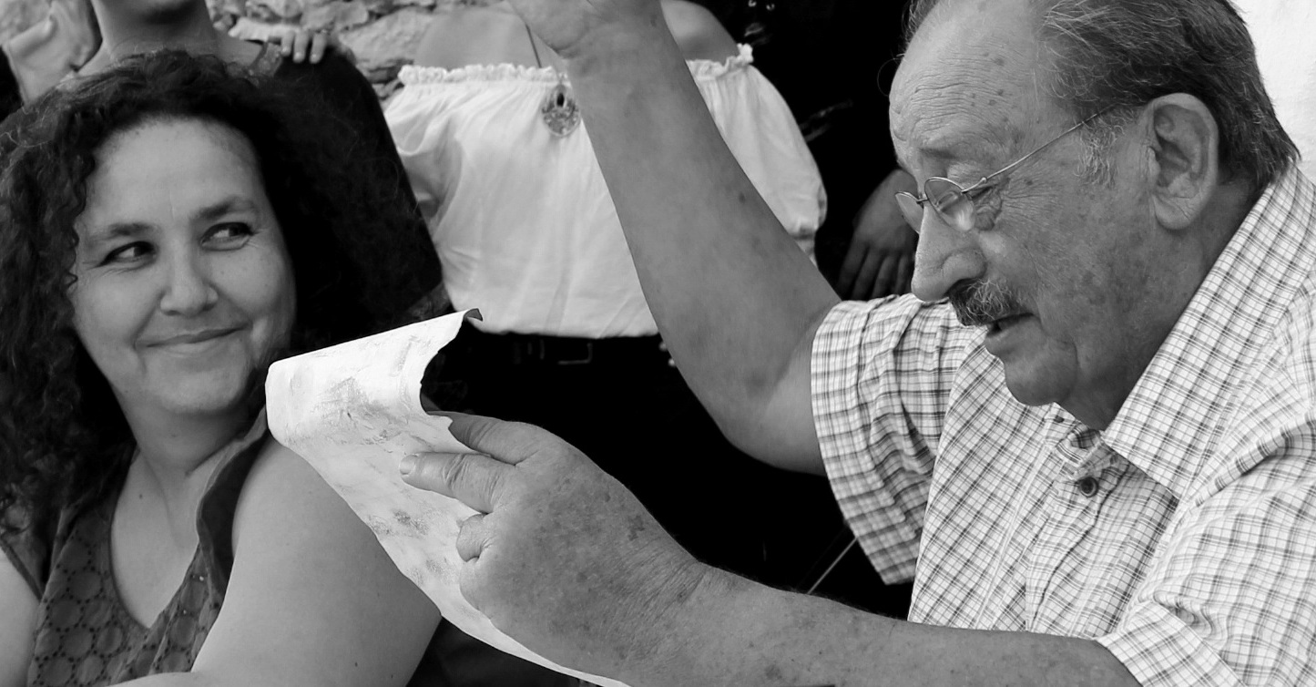 GEORGES BENEDETTI - 20e ANNIVERSAIRE DE L'INSTITUT REGIONAL DU CINEMA ET DE L'AUDIOVISUEL - LECTURE DE LA CHARTE CINE CORSICA A ANTISANTI